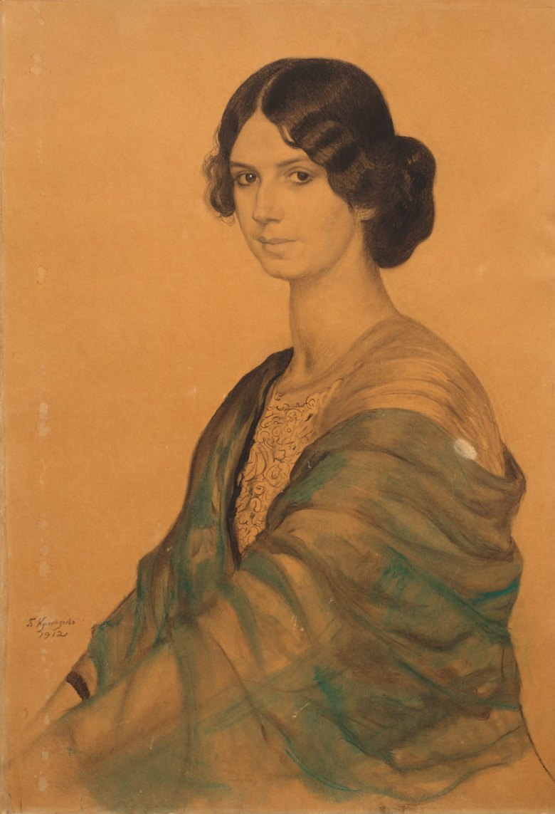 "Портрет госпожи Т." - Бориса Кустодиева - 1912 год